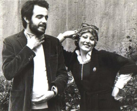 Io, Gaetano Cuomo, detentore del copyright su quest'opera, in quanto ne sono l'unico possessore, la rilascio nel pubblico dominio. La norma vale in tutto il mondo.